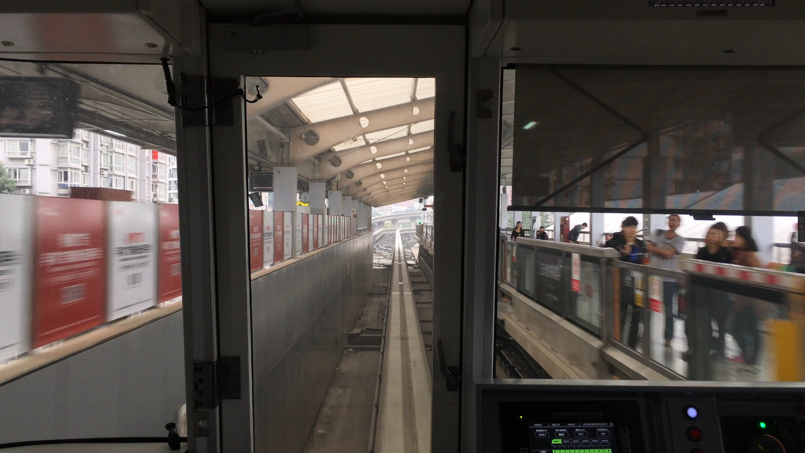 2号线列车下行进入动物园站